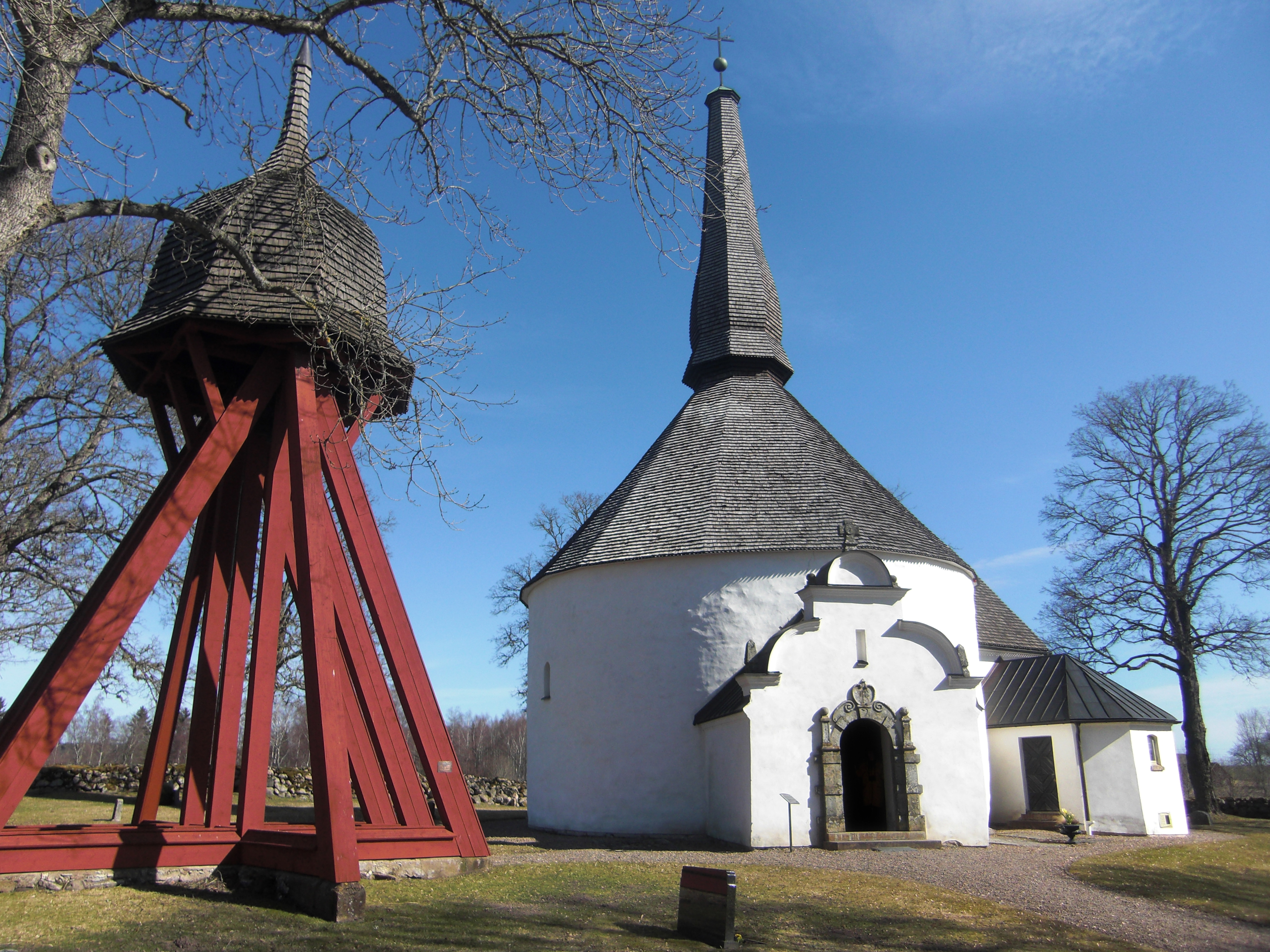 Skörstorps rundkyrka med klockstapel i Skörstorps socken, Vartofta härad, Falköpings kommun, f.d. Skaraborgs län, Skara stift, Västergötland, Västra Götalands län, Sverige.